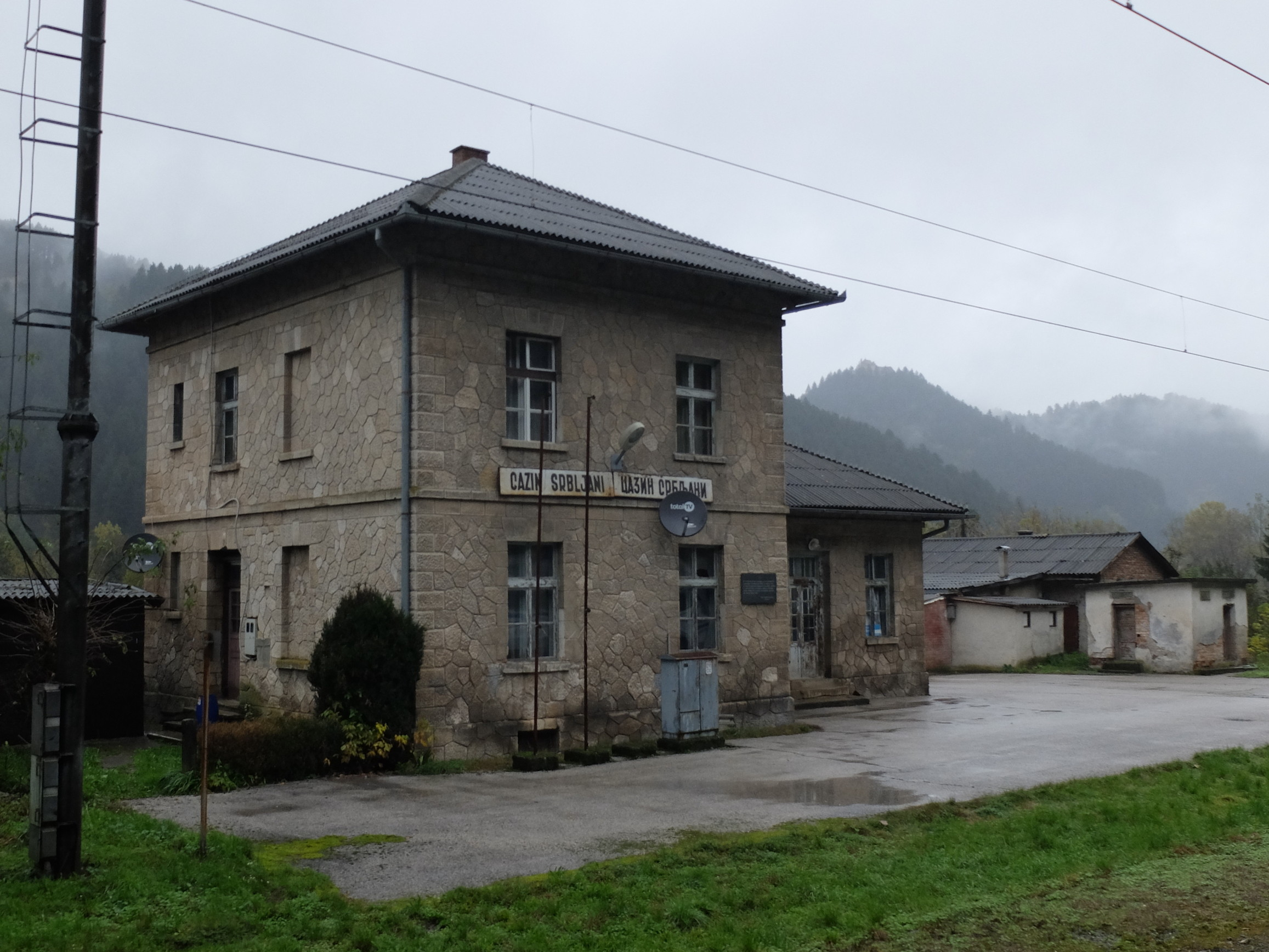 Cazin Srbljani (Željeznička stanica)